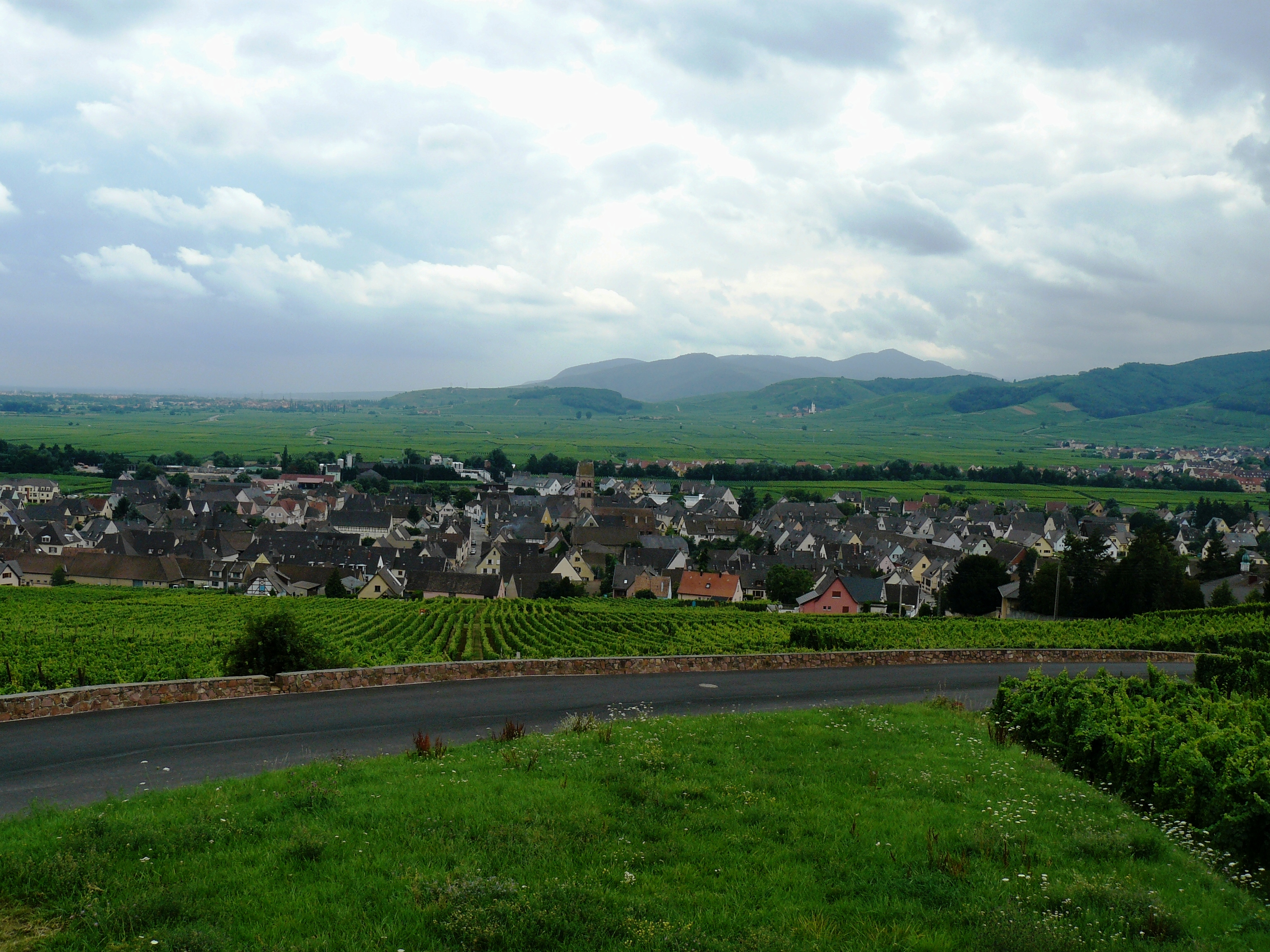 Le village de Sigolsheim et les alentours